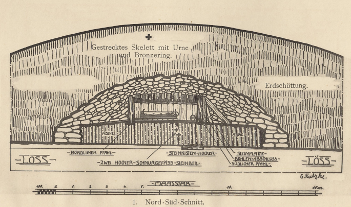 Fürstengrab von Helmsdorf